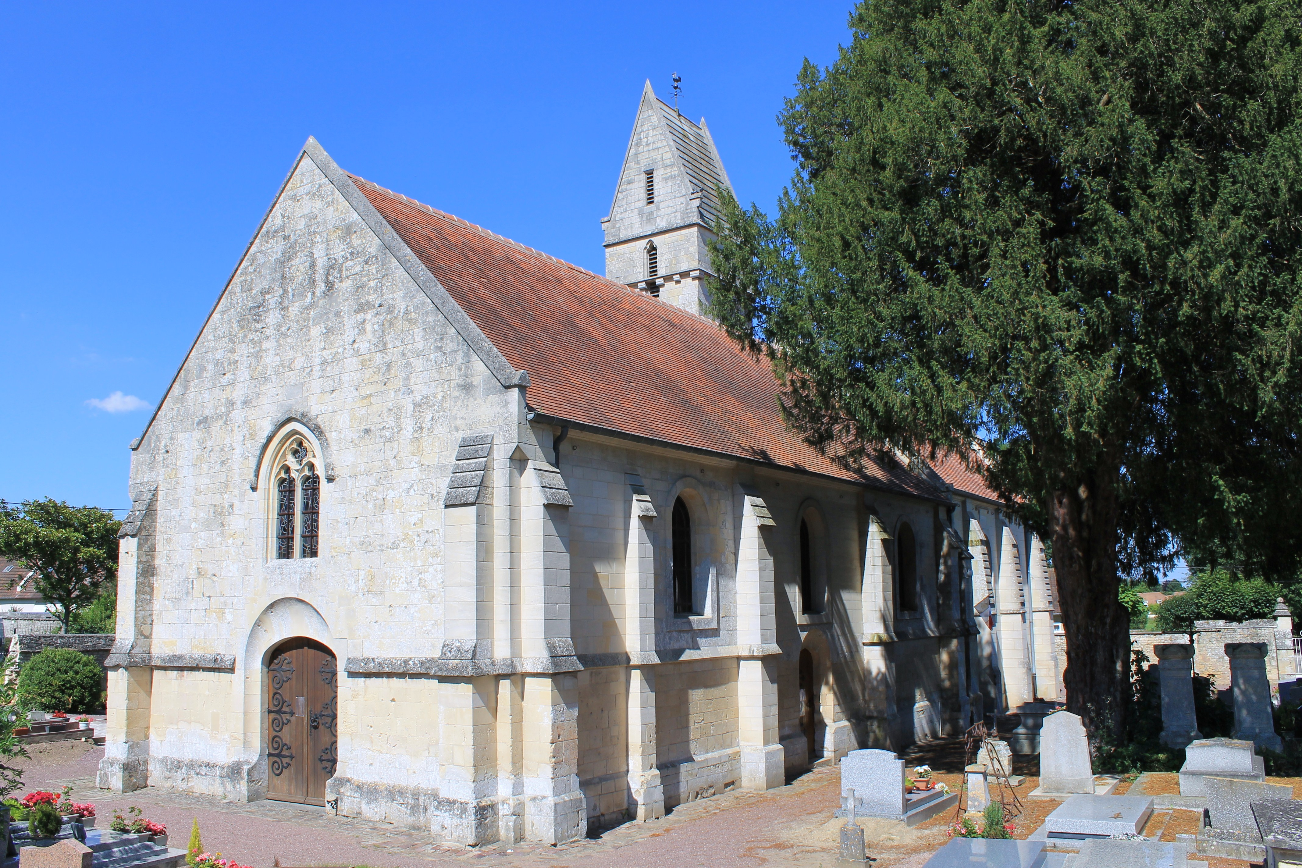 Église Saint-Jean-Baptiste à Éterville, Calvados